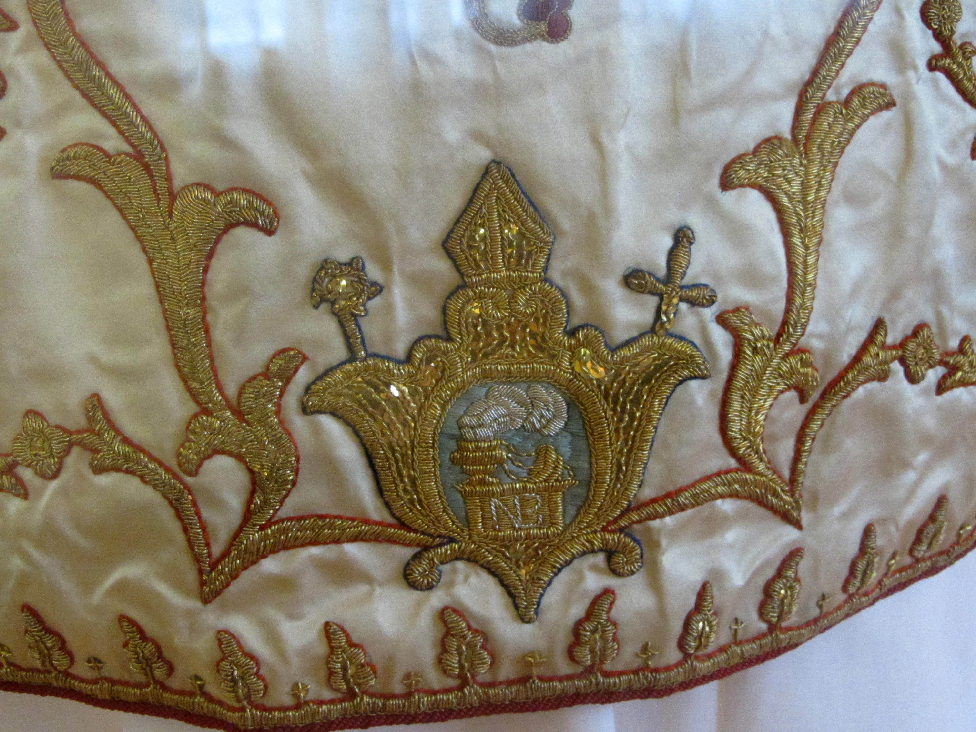 Messgewand Nikolaus Betscher im Wallfahrtsmuseum Maria Steinbach